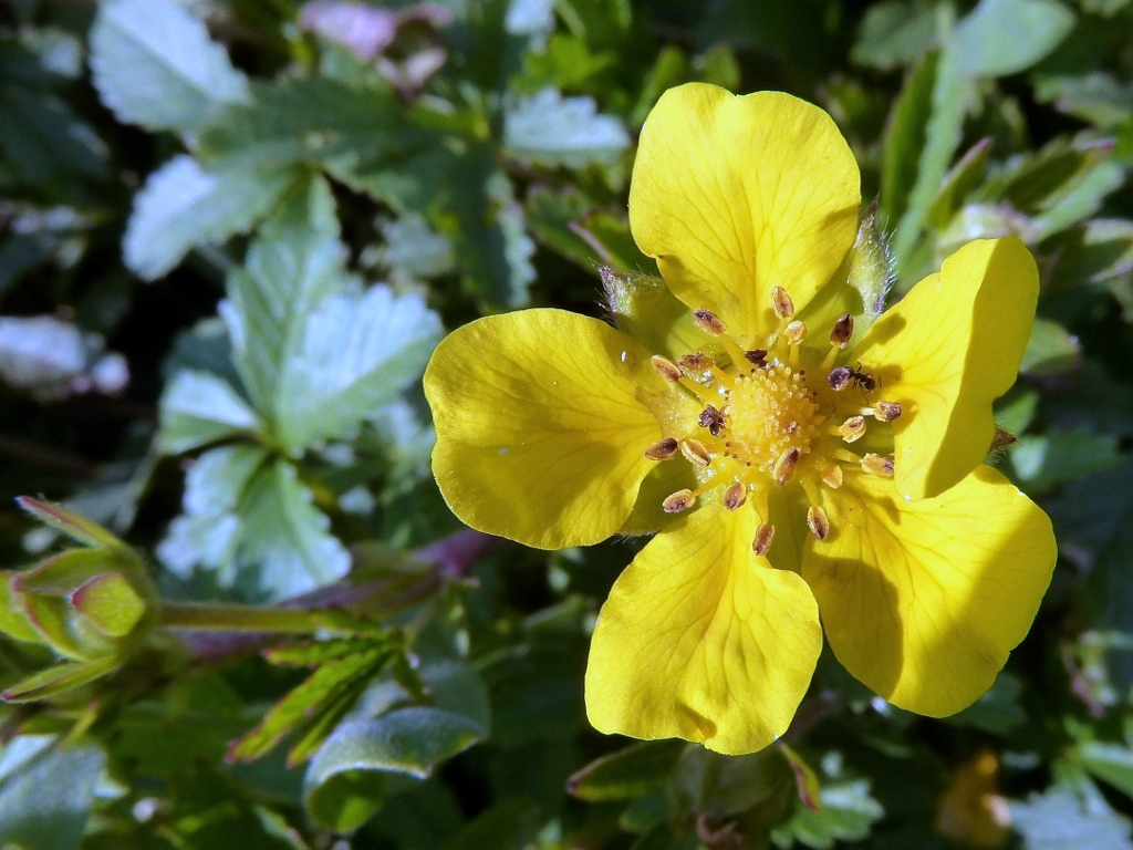 Potentilla reptans (Cincoenrama) : Flor, detalle - La Huerta, Albatera (Alicante, España).